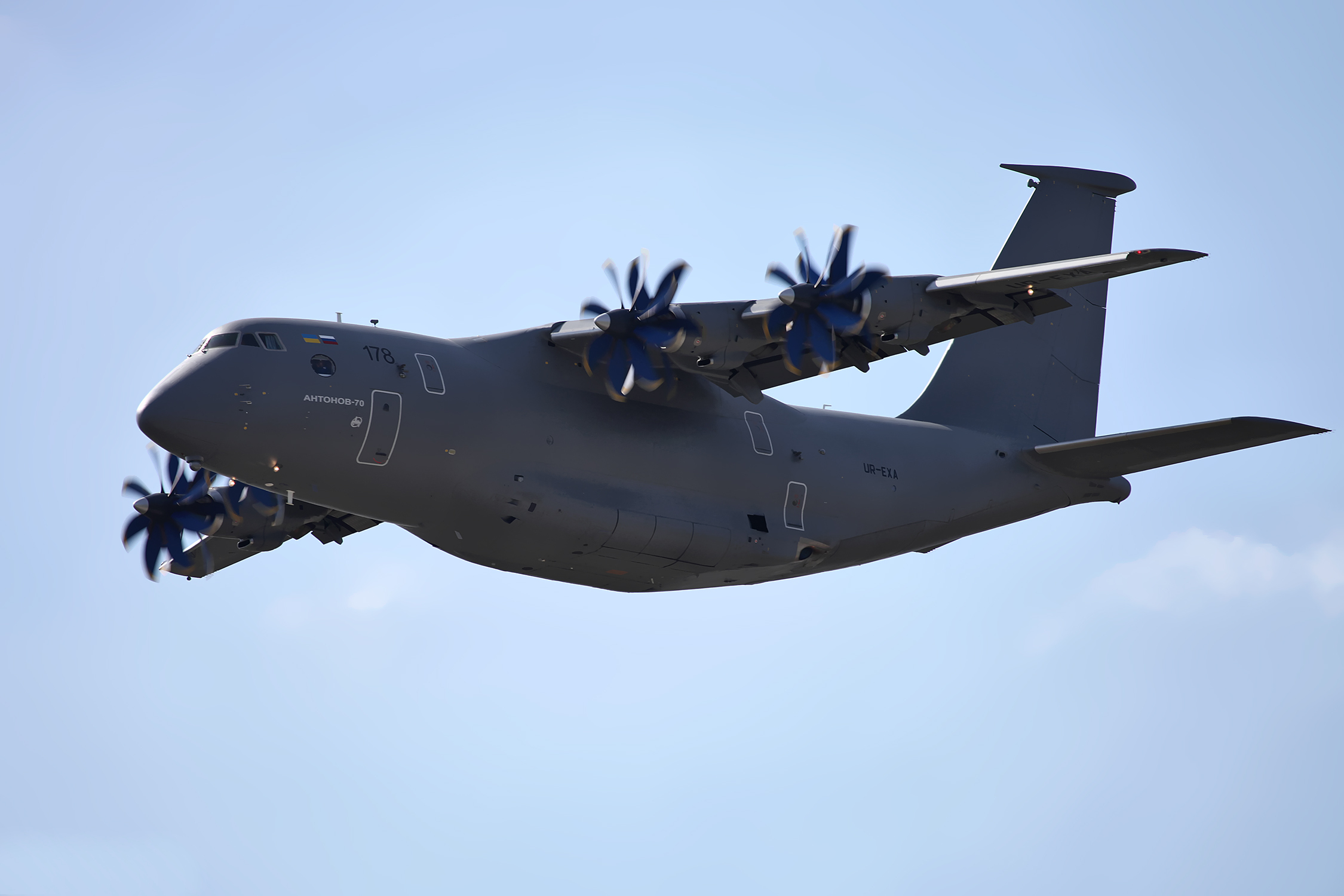 Ан-70 (An-70)